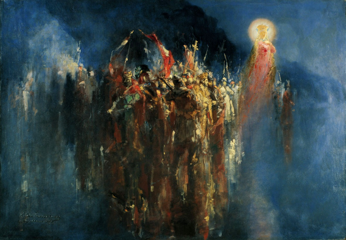 Wizja